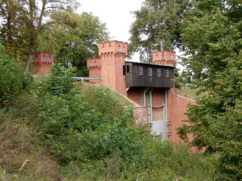 śluza na Liwie-Renawie - widok od strony południowej